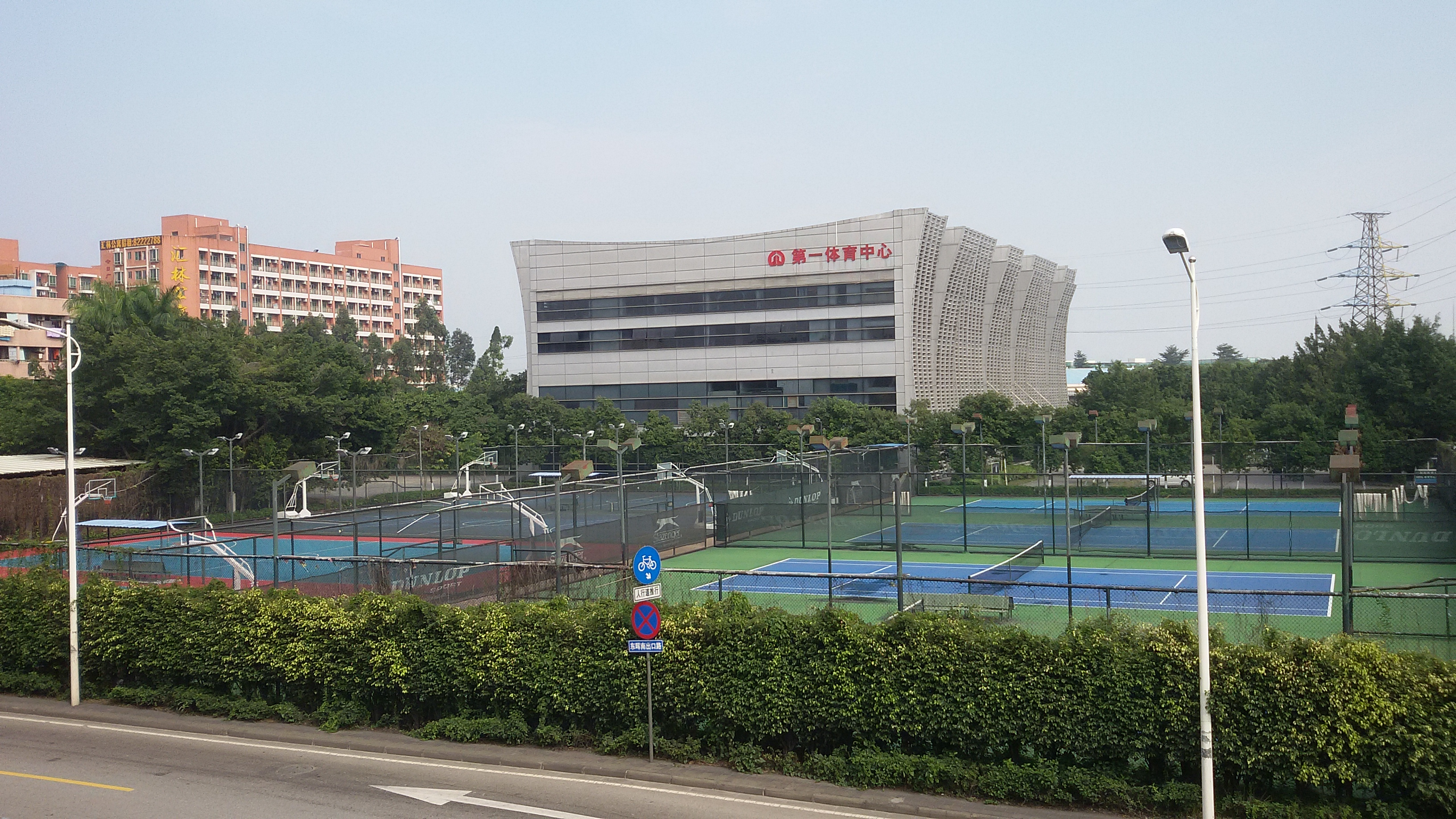 粵語: 開發區第一體育中心